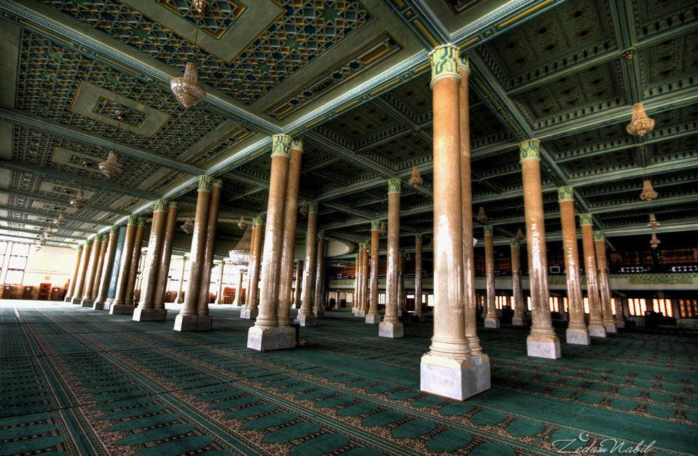 Salle de prier de la grande Mosquée de Batna